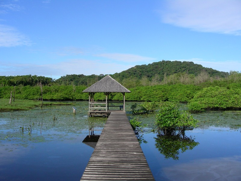 ponton des salines de montjoly